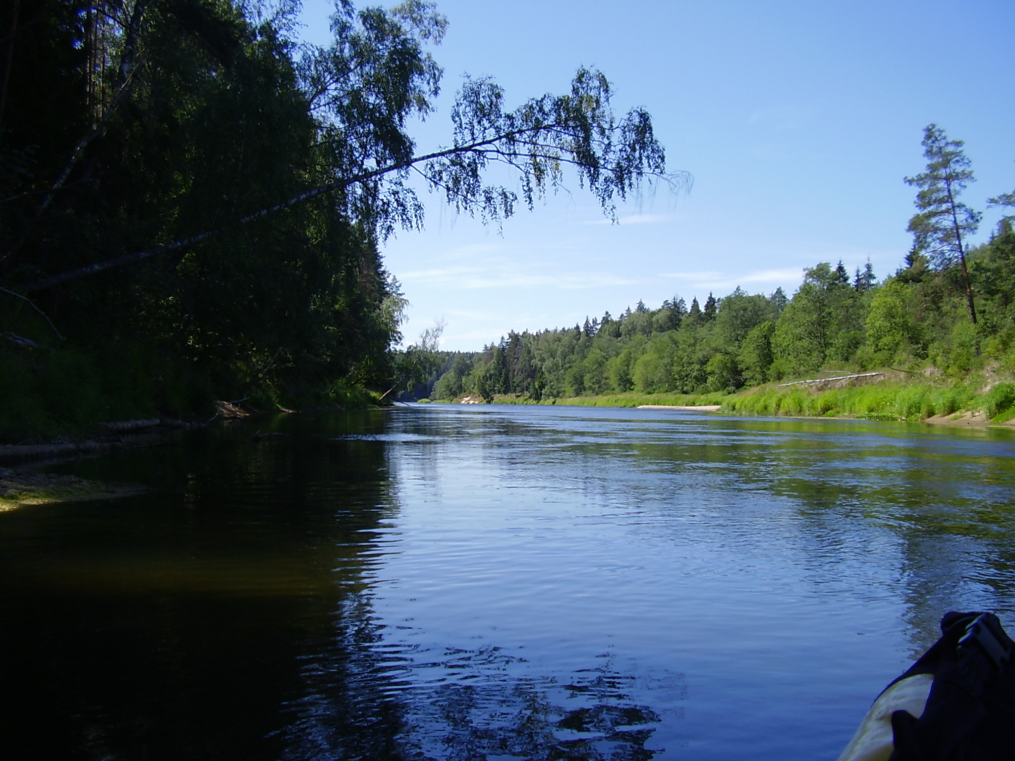 La rivière Gauja en Lettonie.